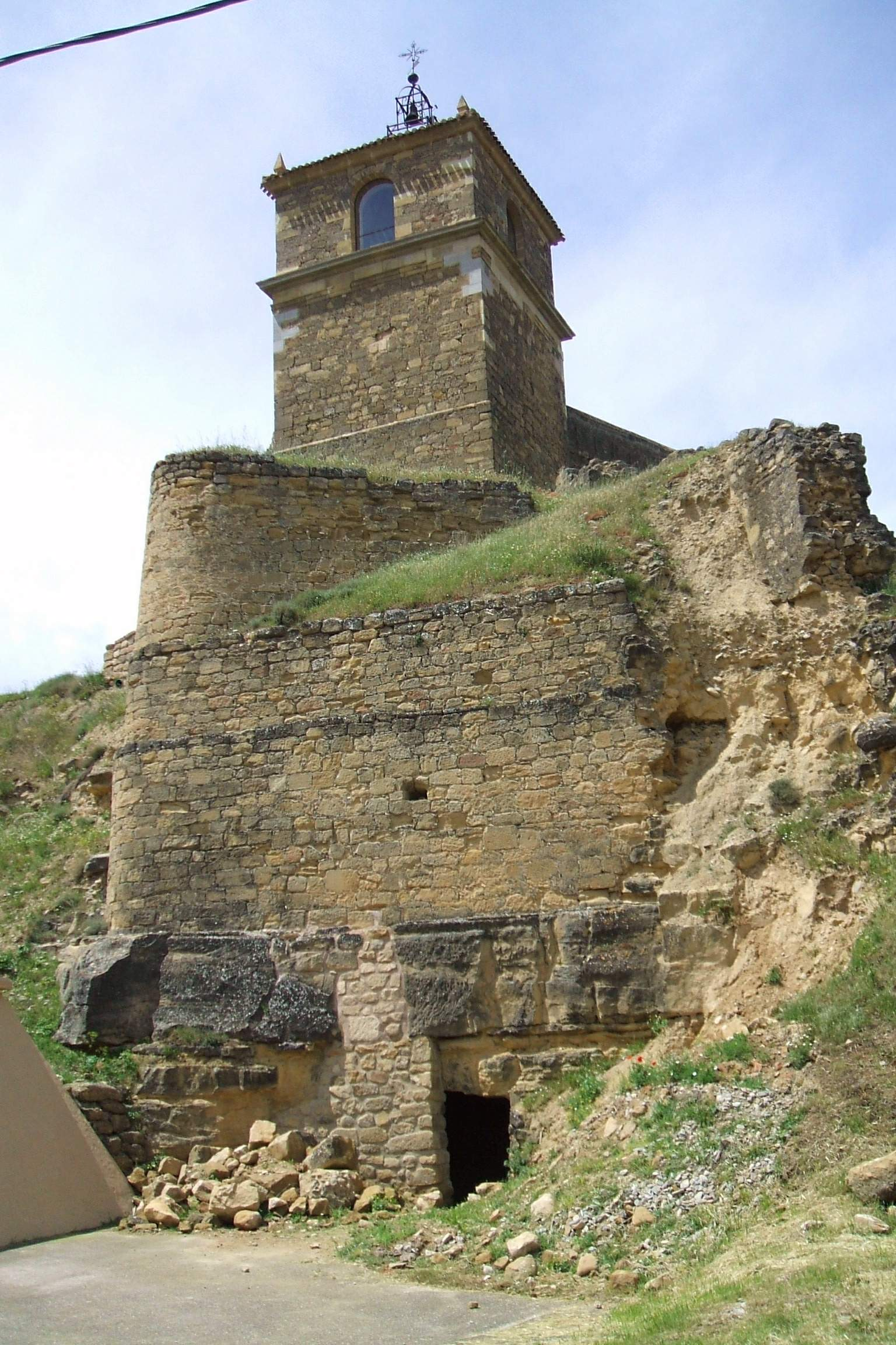 San Vicente de la Sonsierra (La Rioja, España) - Castillo